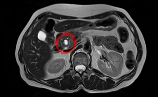 Intraduktale papilläre muzinöse Neoplasie des Pankreas; Seitengangtyp. Gleichzeitig besteht ein Pankreas divisum. T2w axial.